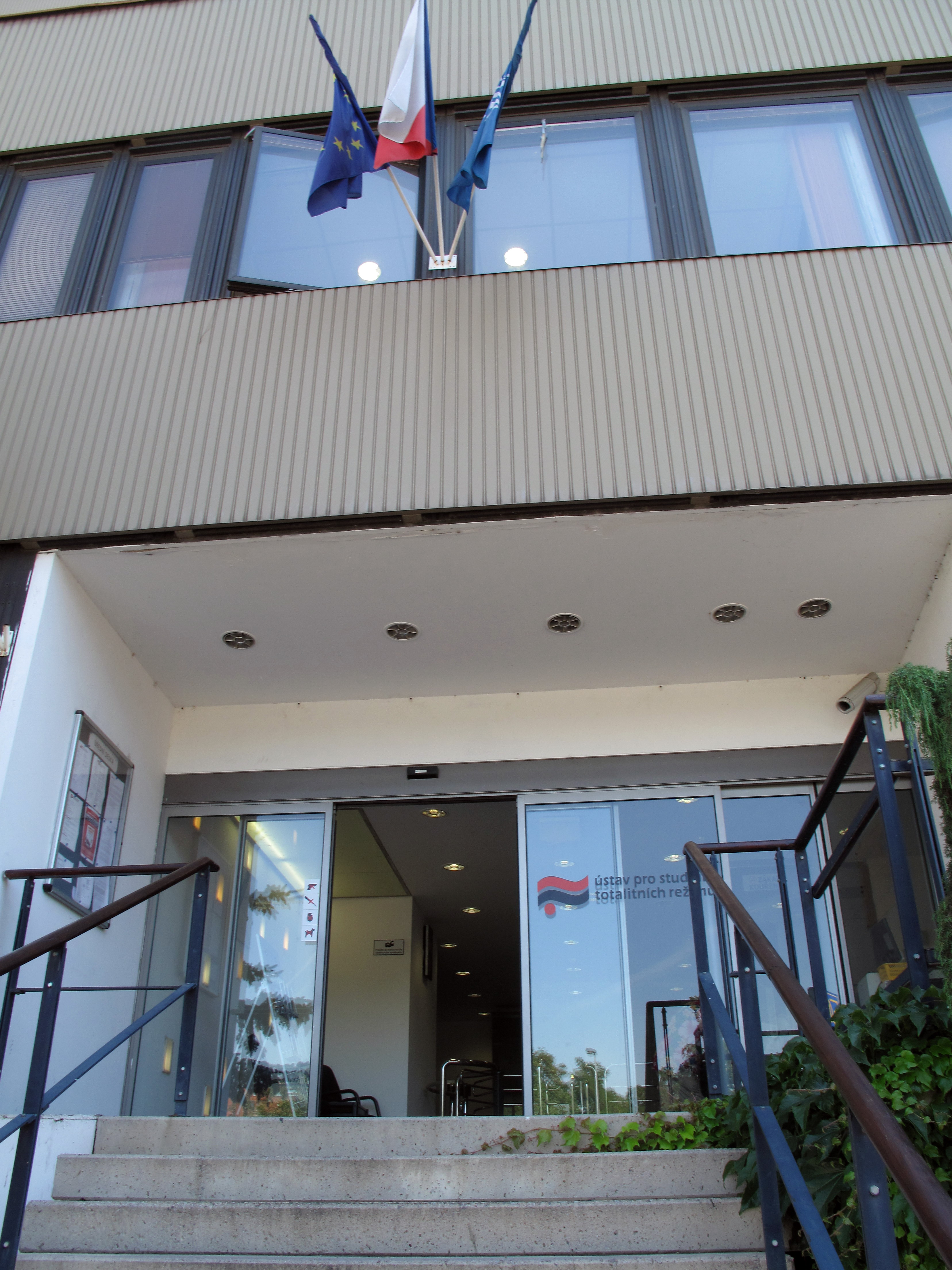 Budova Ústavu pro studium totalitních režimů